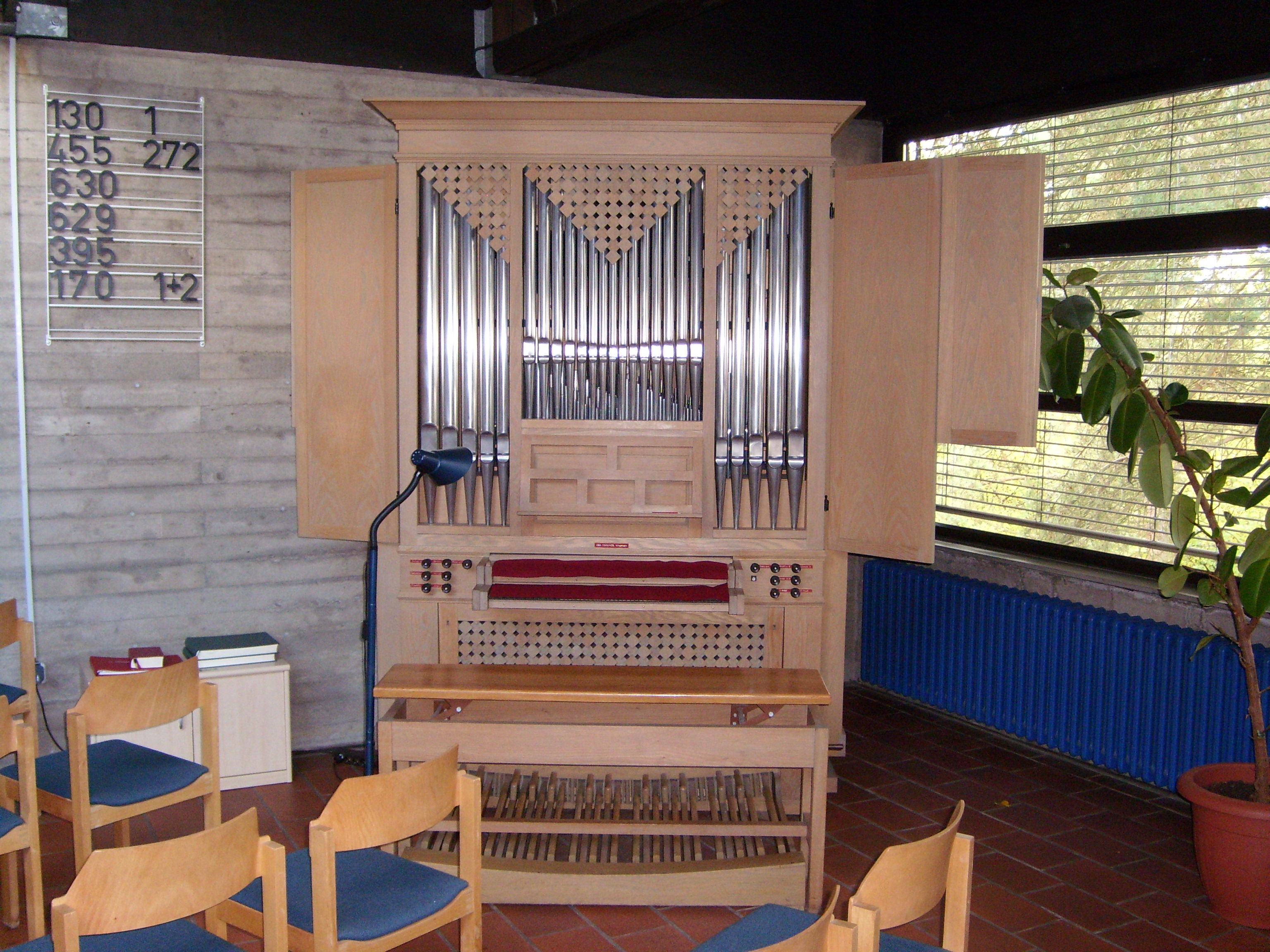 Orgel im evangelischen Gottesdienstraum des Ökumenischen Zentrums Thomaskirche Marburg (2016).